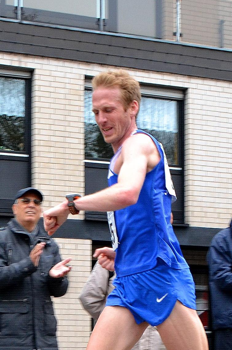 DM HM 2013 Refrath